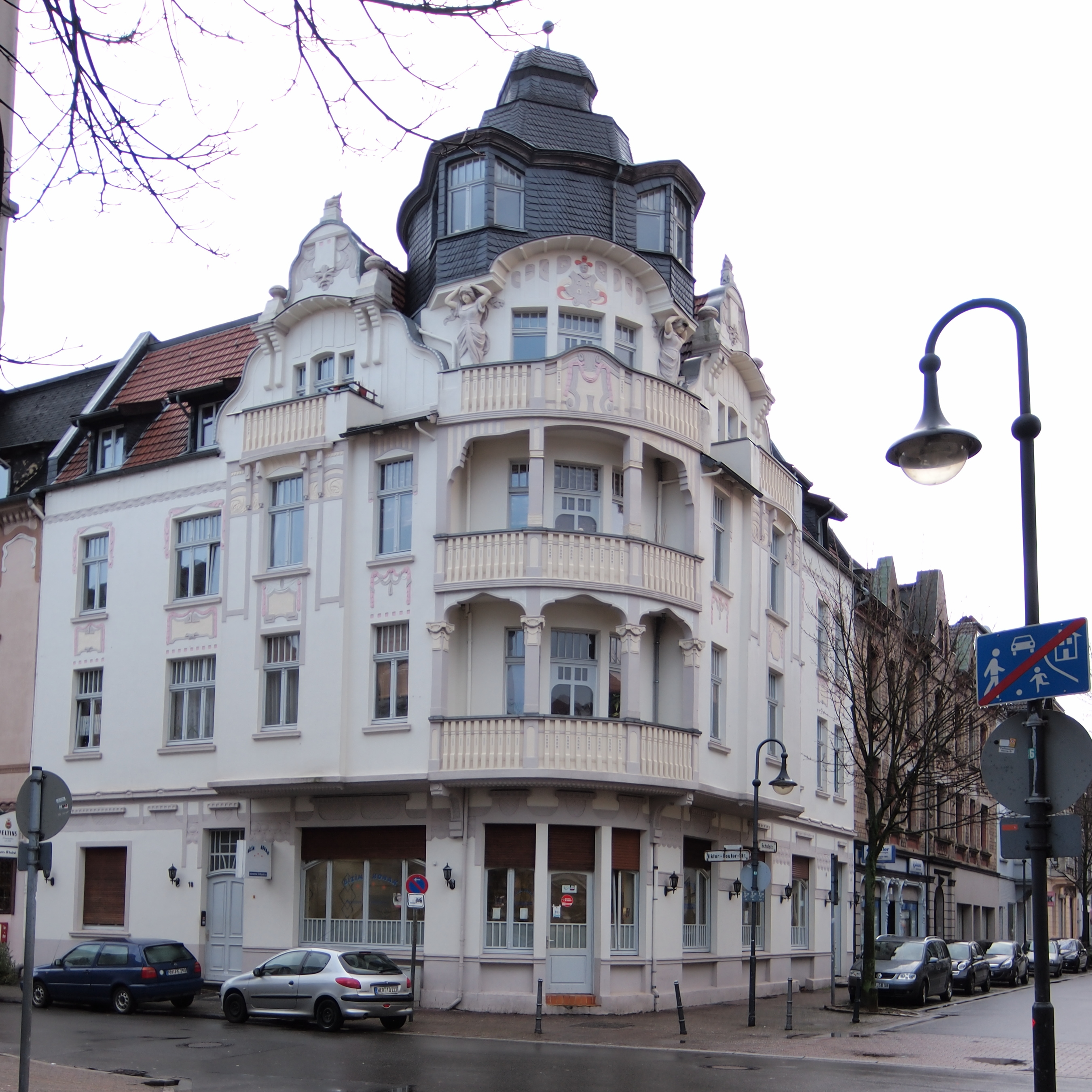 Wohn- und Geschäftsgebäude Viktor-Reuter-Straße 18 Ecke Schulstraße in Herne, Baudenkmal This is the photograph of an architectural monument. It is part of the list of cultural monuments of Herne, no. 60